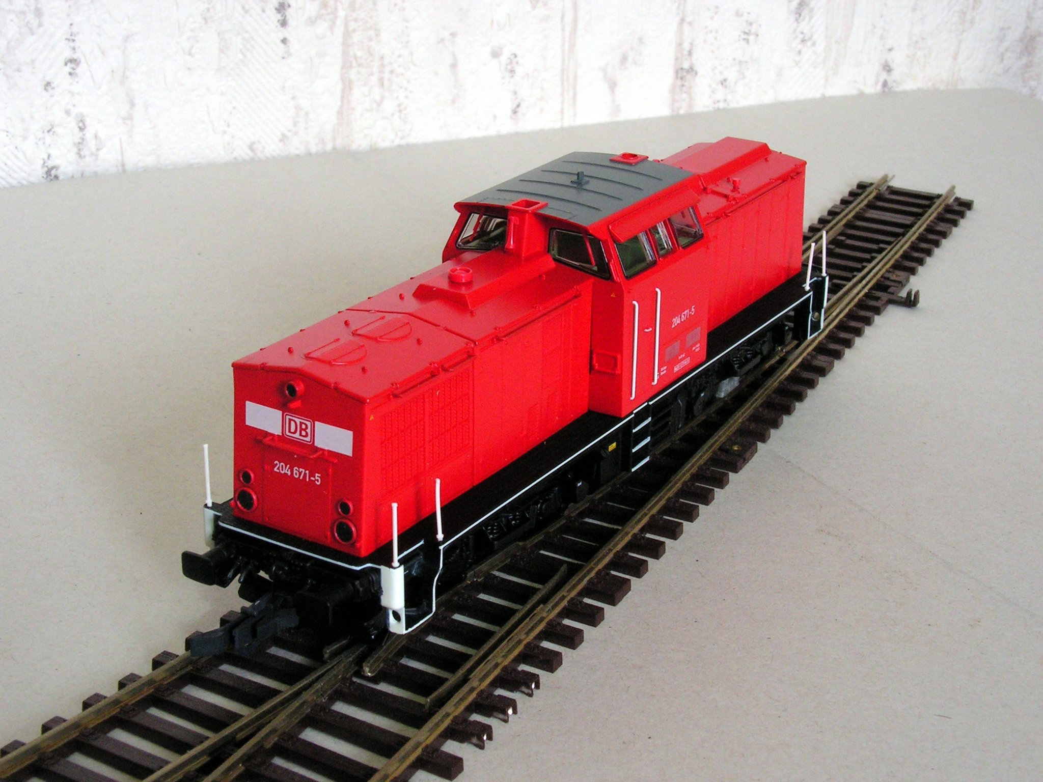 Roco-Modell einer DR-Baureihe V 100